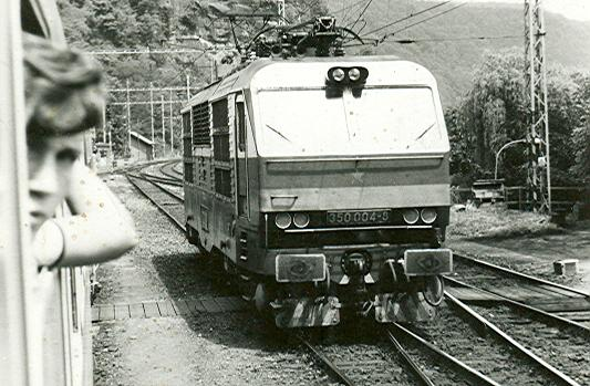 ES 499.0004 im Bahn Děčín